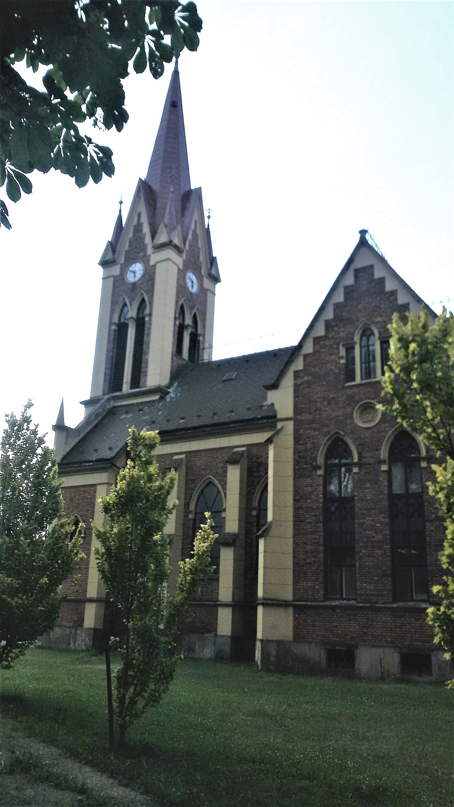 Kostel Československé církve husitské